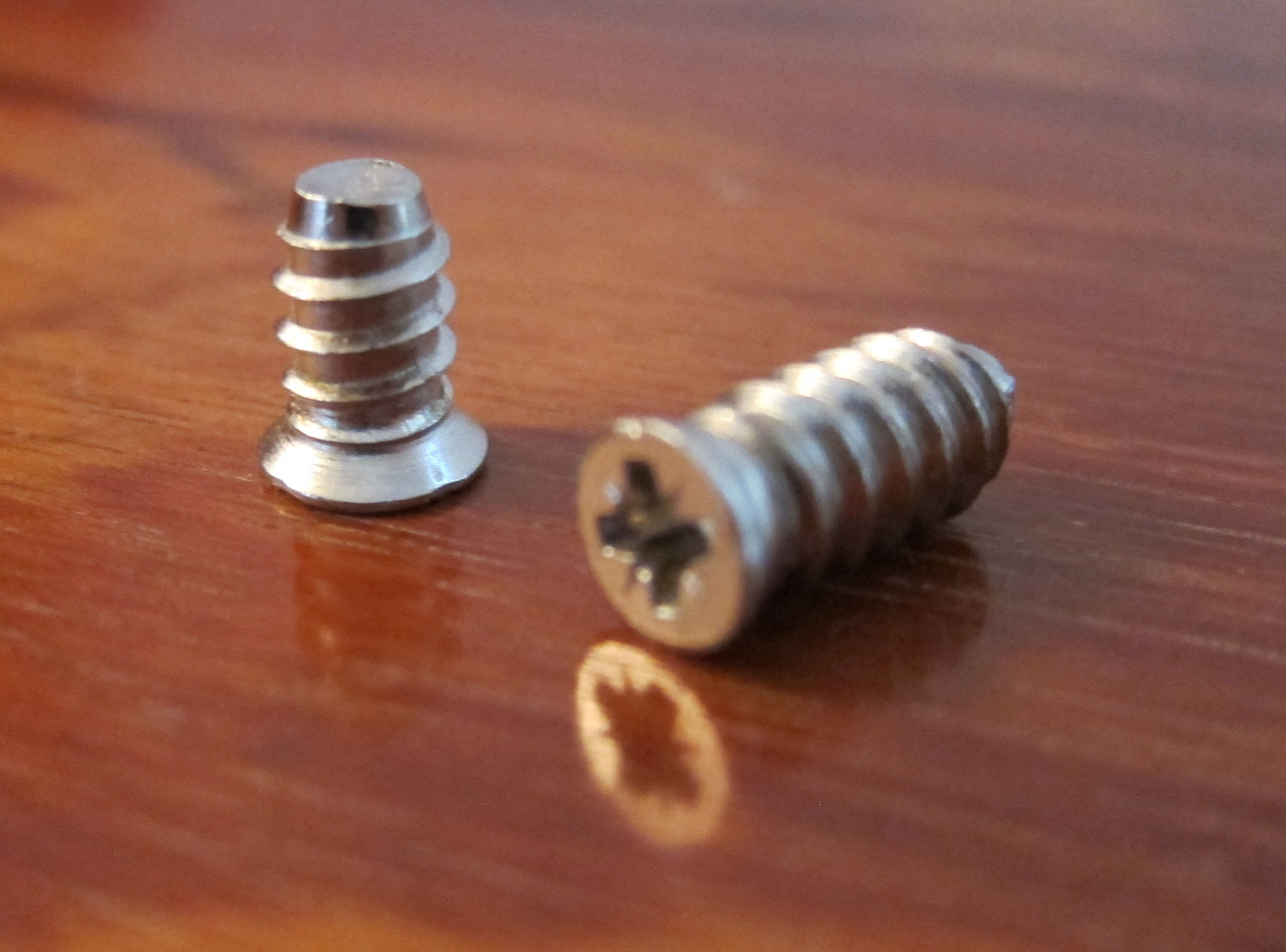 Zwei Euroschrauben 10 und 13mm